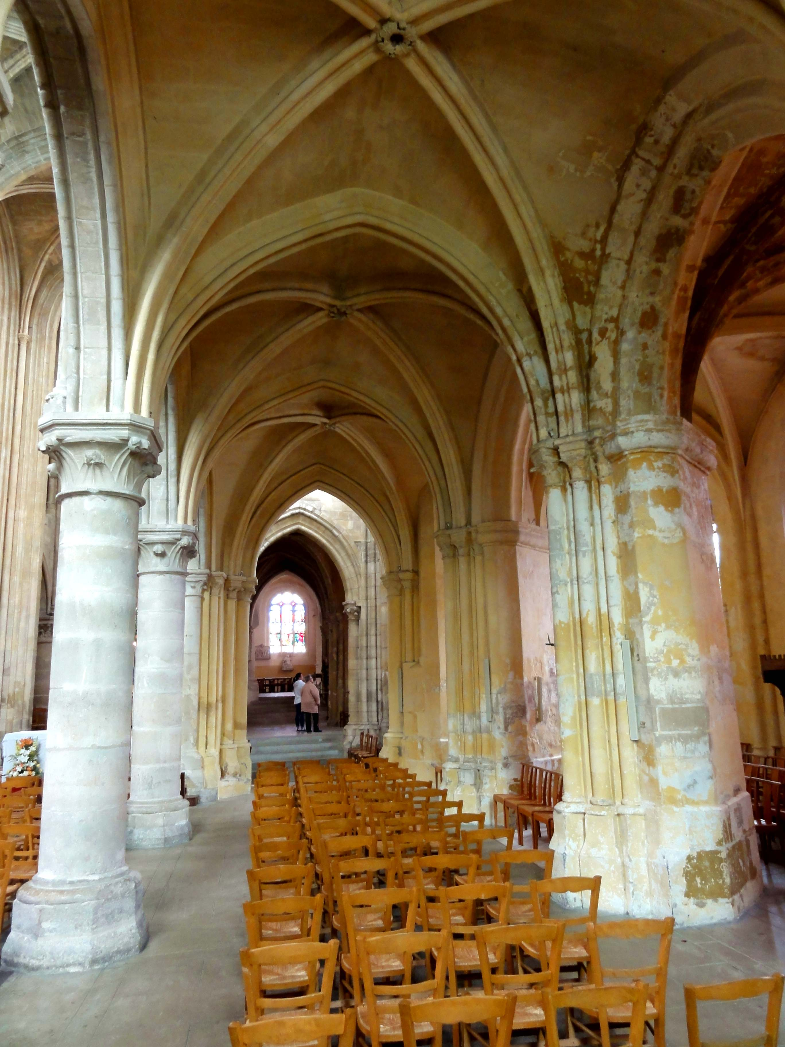 Intérieur de l'église - voir titre.